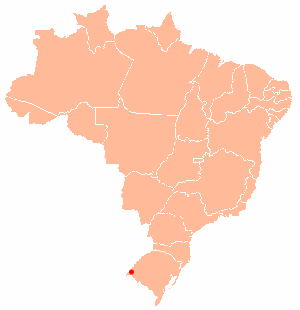 Lage von Uruguaiana